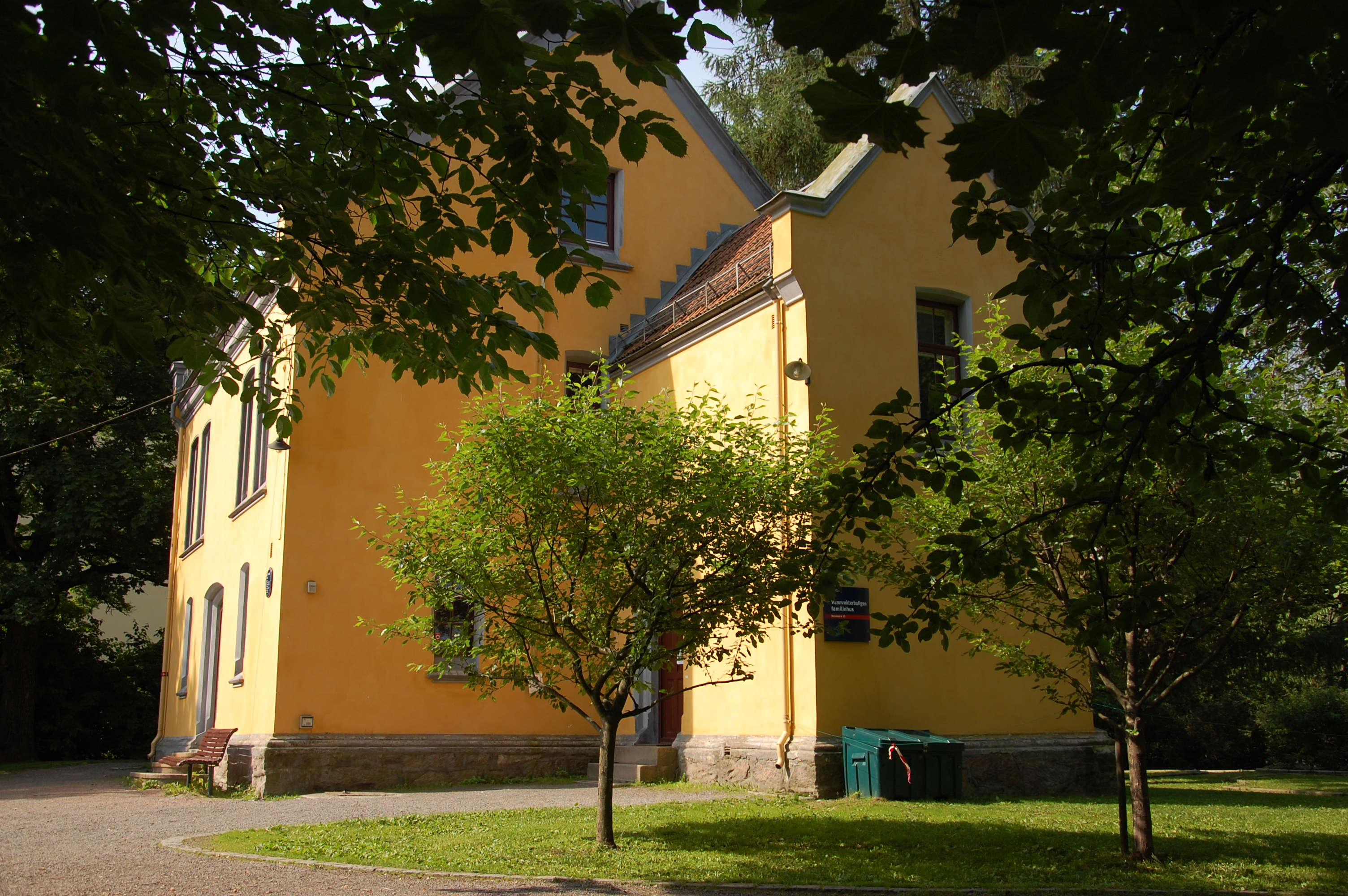 Vannvokterboligen Heftyeløkken, Riflegata 13, Bjølsen/Oslo